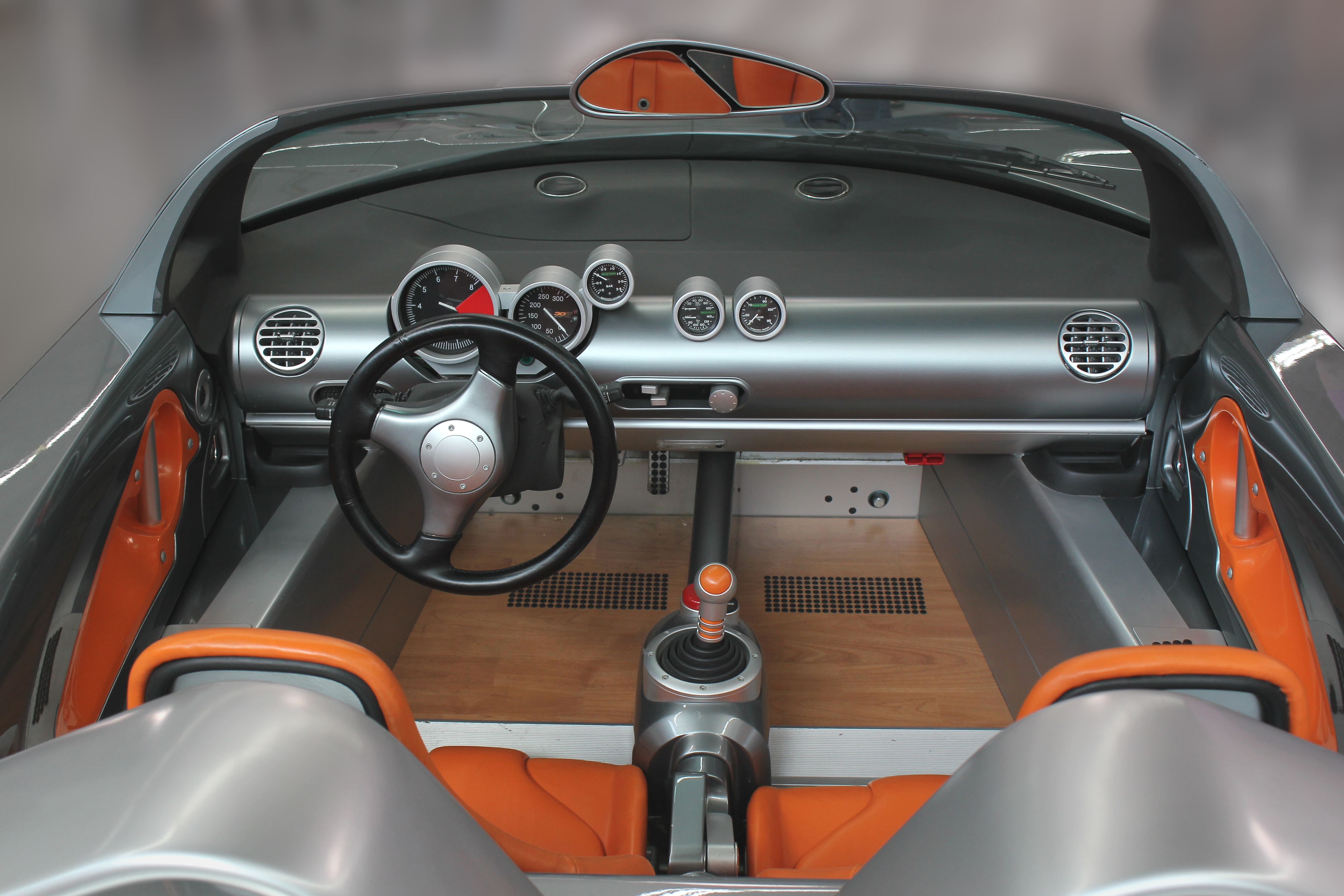 Zender Thirty 7, Baujahr 1999; VW-4-Zylinder-Reihenmotor quer in Fahrzeugmitte, 1,8 Liter Hubraum, 230 PS, Konstruiert von Zender-Mitarbeitern in Mülheim-Kärlich. Der Wagen wurde auf der IAA 1999 in Frankfurt erstmals vorgestellt. Er blieb ein Einzelstück.